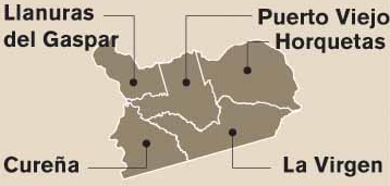 Mapa de los distritos del cantón de Sarapiquí, provincia de Heredia, Costa Rica.